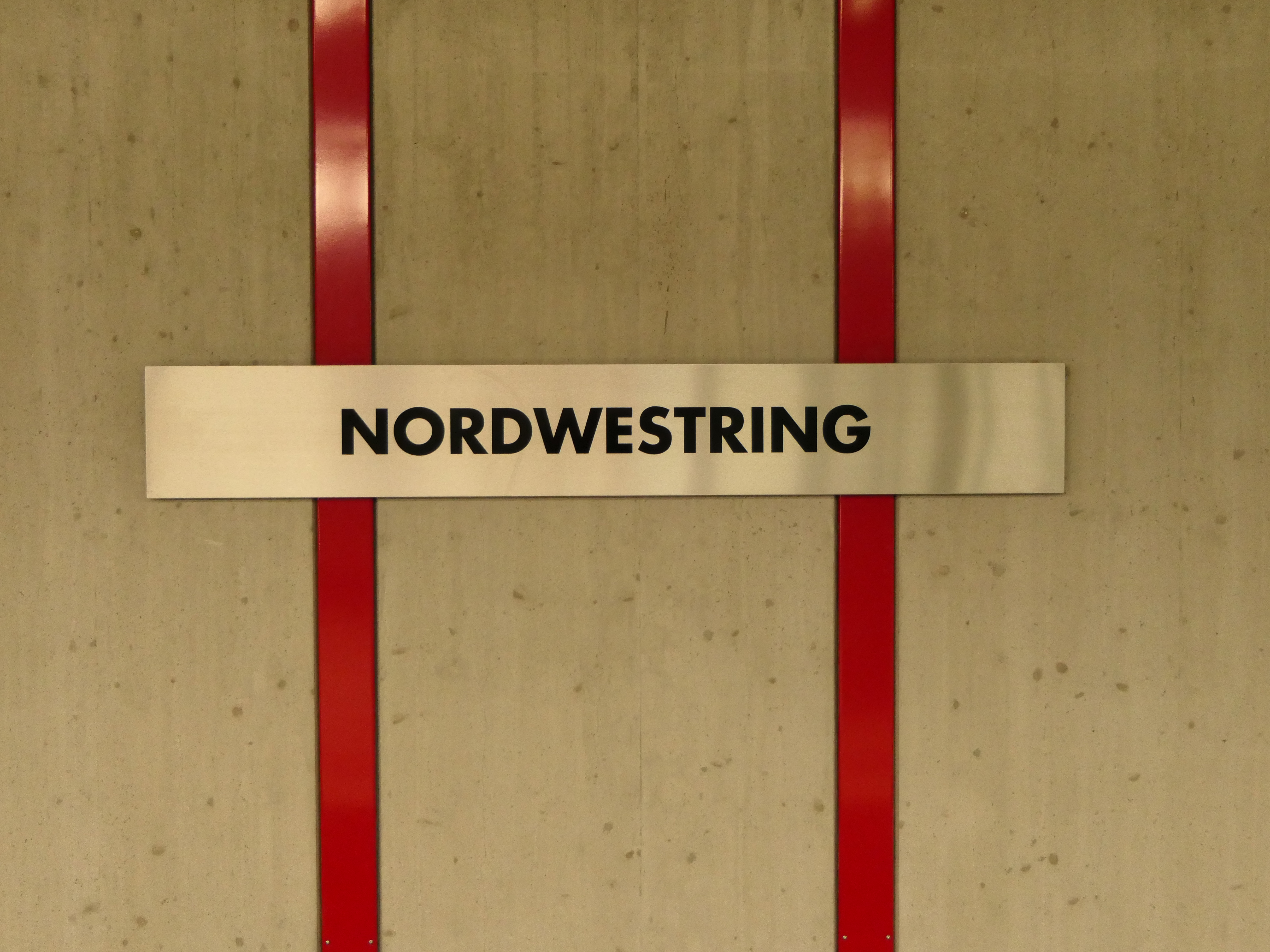 Stationsname an den Bahnsteigwänden am U-Bahnhof Nordwestring in Nürnberg.